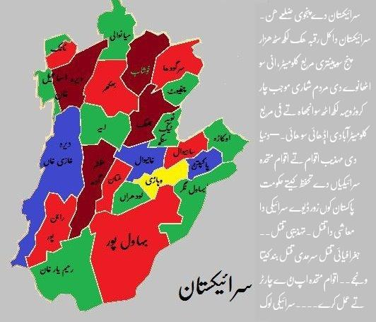 سرائیکستان دے پنجوی ضلعے ھن۔ سرائیکستان دا کل رقبہ ھک لکھ سٹھ ھزار پنج سو پینتری مربع کلومیٹر ، انی سو اٹھانوے دی مردم شماری موجب چار کروڑ ویہہ لکھ اٹھ سو انجھاہ تے فی مربع کلومیٹر آبادی اݙھائی سو ھائی۔ —دنیا دی مہذیب اقوام تے اقوام متحدہ سرائیکیاں دے تحفظ کیتے حکومت پاکستان کوں زور ڈیوے سرائیکی دا معاشی دا قتل ۔تہذیبی قتل۔۔ جغرافیائی قتل سرحدی قتل بند کیتا ونجے۔۔ اقوام متحدہ اپݨے چارٹر تے عمل کرے۔۔۔۔سرائیکی لوک